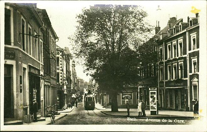 Esch-Alzette, le Minettstram dans l'Avenue de la Gare. Carte postale.